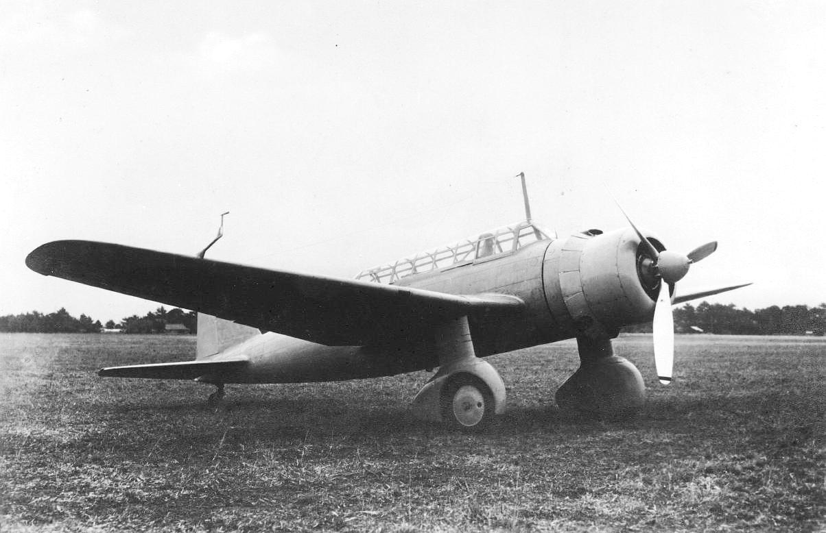 浜松付近の上空で撮影された97式軽爆。